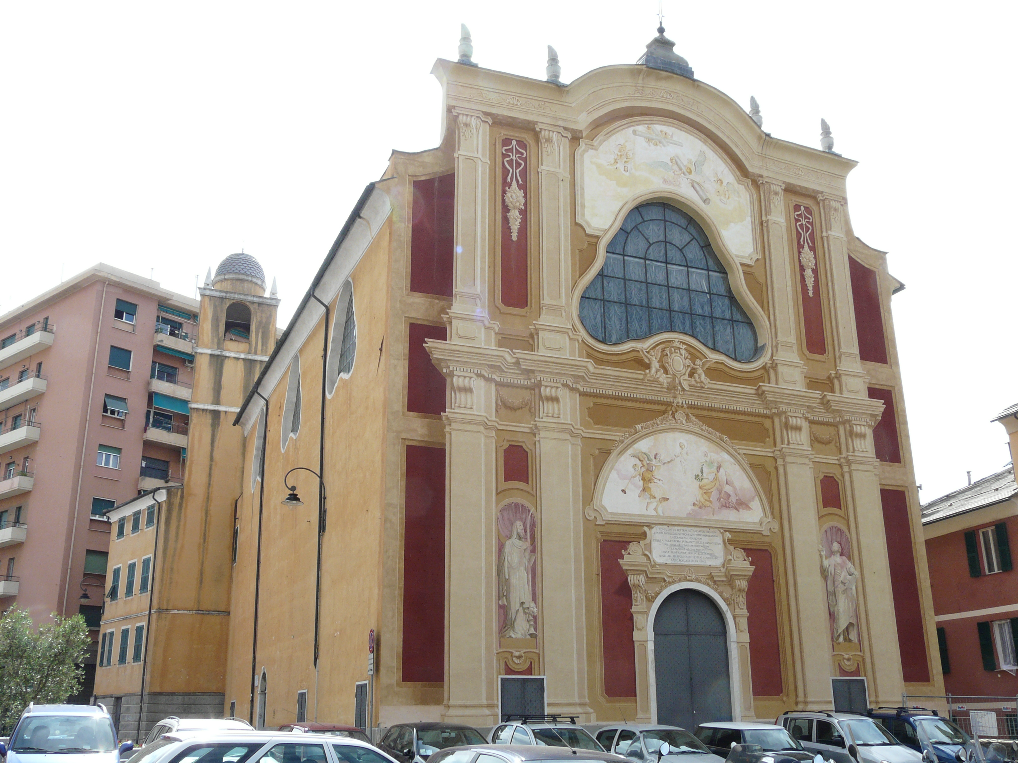 Chiesa di San Salvatore, Genova, Liguria, Italia